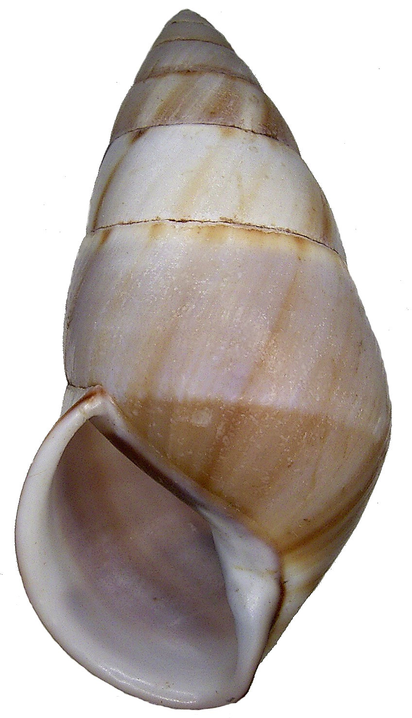 Familie: Camaenidae Groesse: 55 mm Fundort: Indonesien, Sumatra Photo: U.Schmidt, 2006